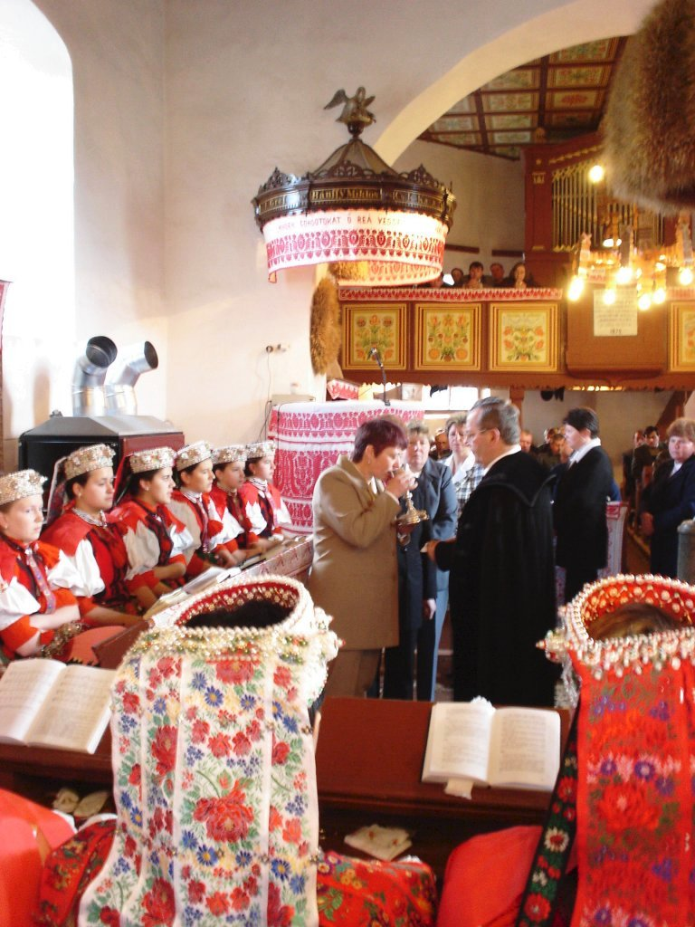 Kalotaszentkirályi úrvacsora (Erdély)